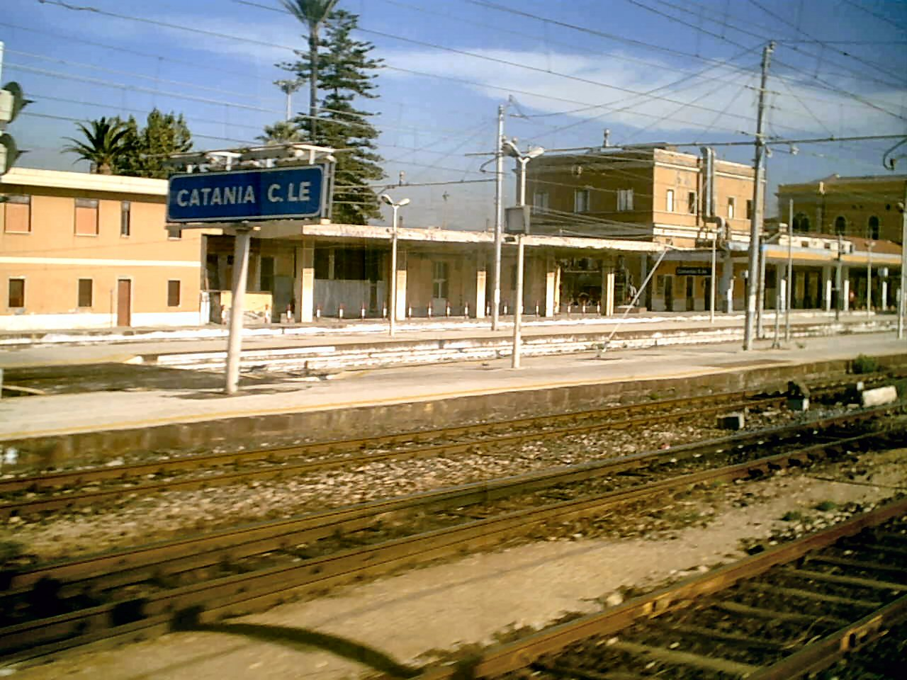 Foto interno stazione